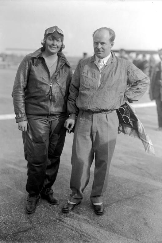 Der Großflugtag auf dem Centralflughafen in Berlin Tempelhof, bei welchem die berühmtesten deutschen Flieger vor einer hunderttausendköpfigen Menschenmenge ihre waghalsigen Schau- und Kunstflüge ausführten. Die beiden Prominenten des Großflugtages! Thea Rasche und Ernst Udet, die berühmten deutschen Kunstflieger.